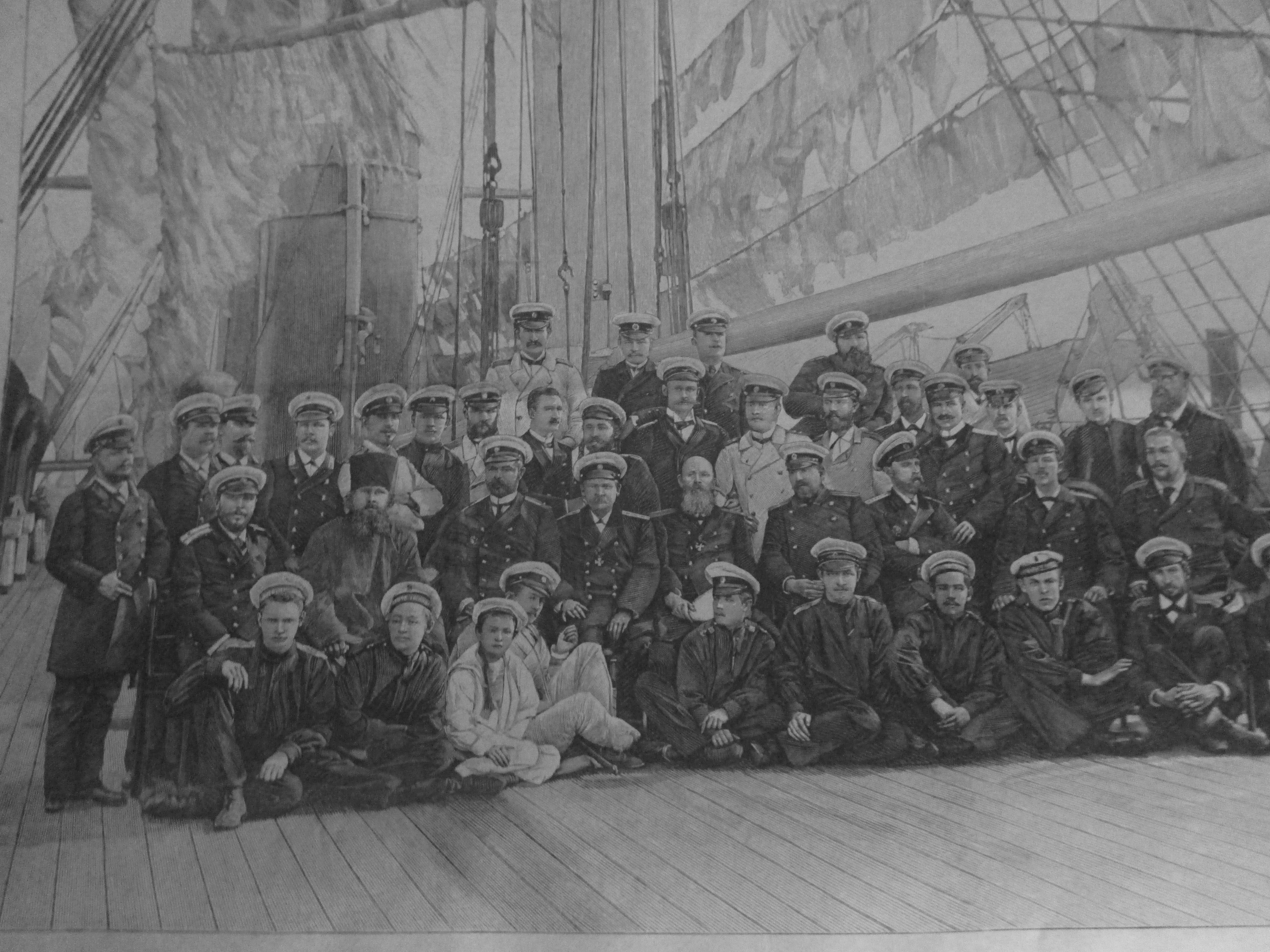 Équipage du cuirassé Empereur Nicolas Ier en 1893, in L'Illustration, n° 2642, 14 octobre 1893